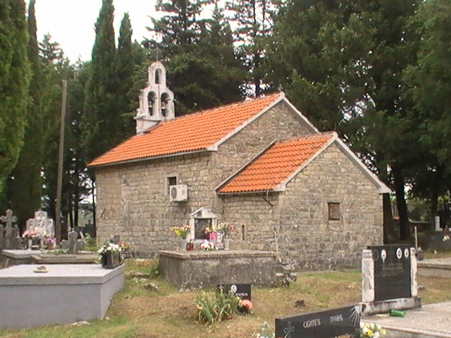 Pravoslavna crkva svetog Georgija u Kričkama kod Drniša.